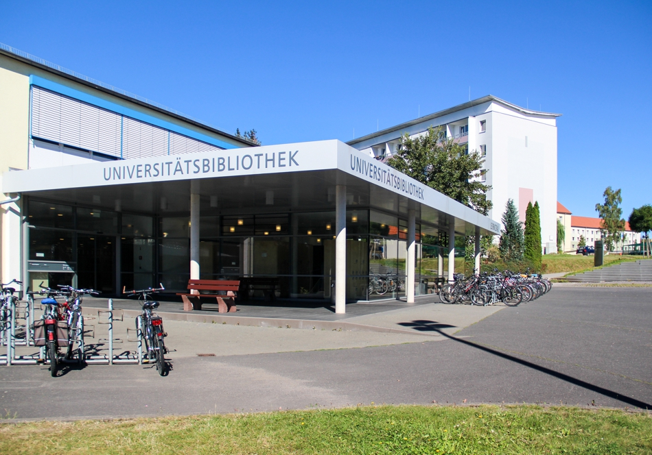 Eingang der Hauptbibliothek in der Langewiesener Str. 37